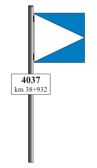 Segnali Ferroviari